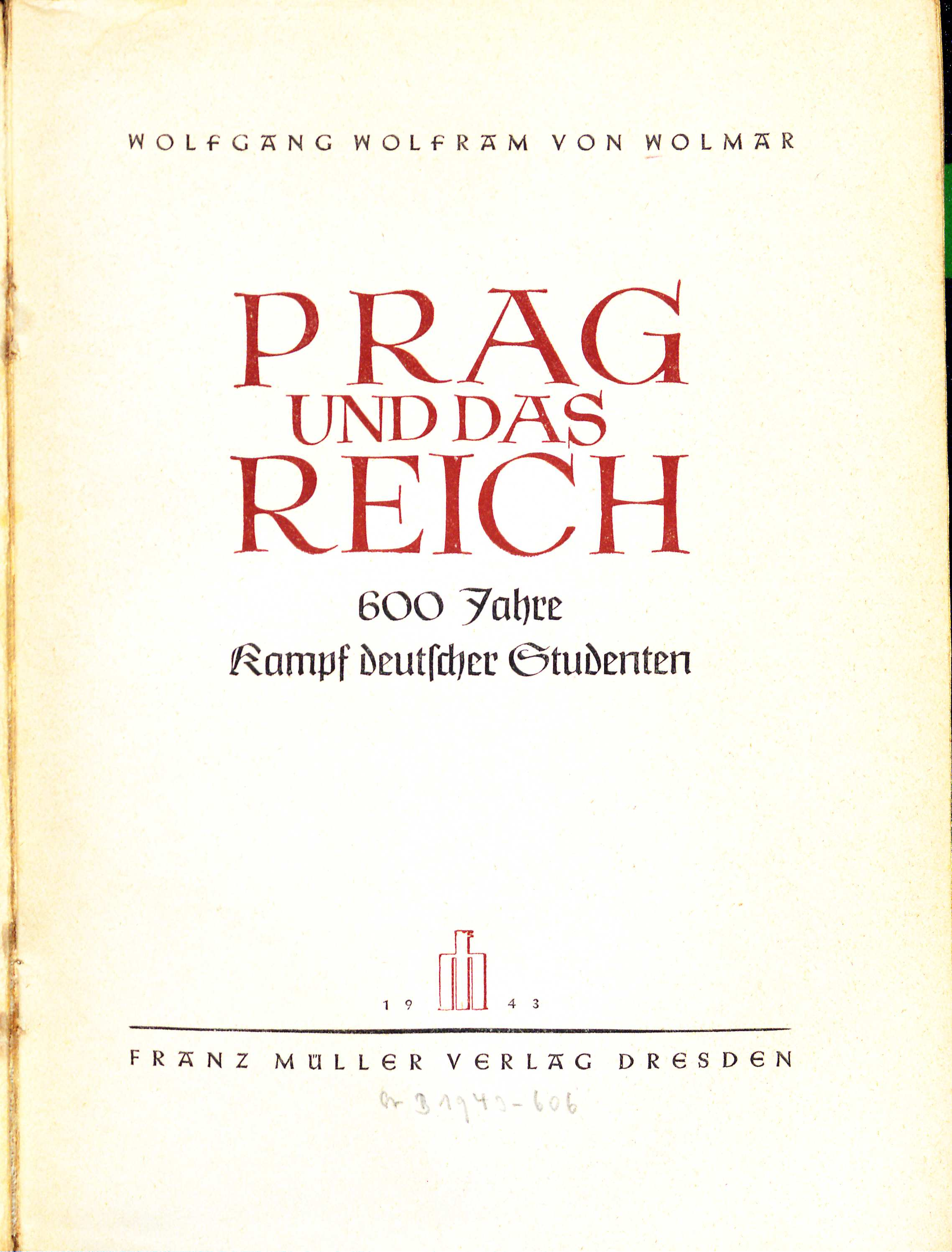 Wolfgang Wolfram von Wolmar Prag und das Reich Titel